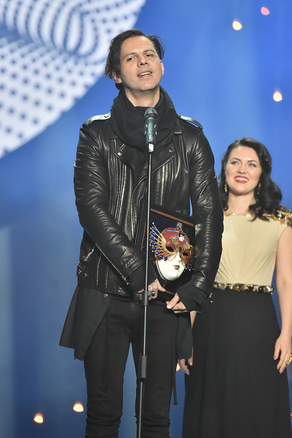 Премия Золотая маска - 2017 года